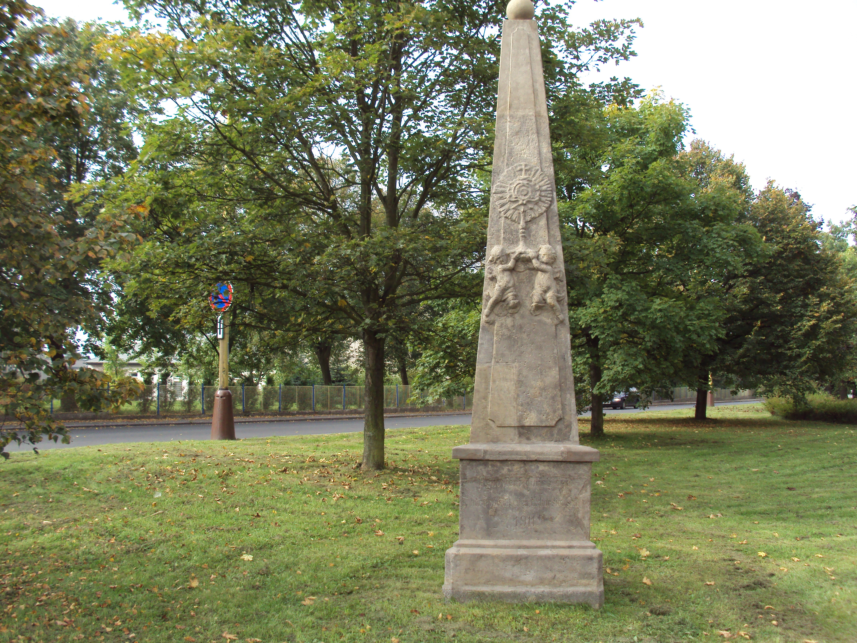 Pomník k nalezení ukradené monstrance z kostela